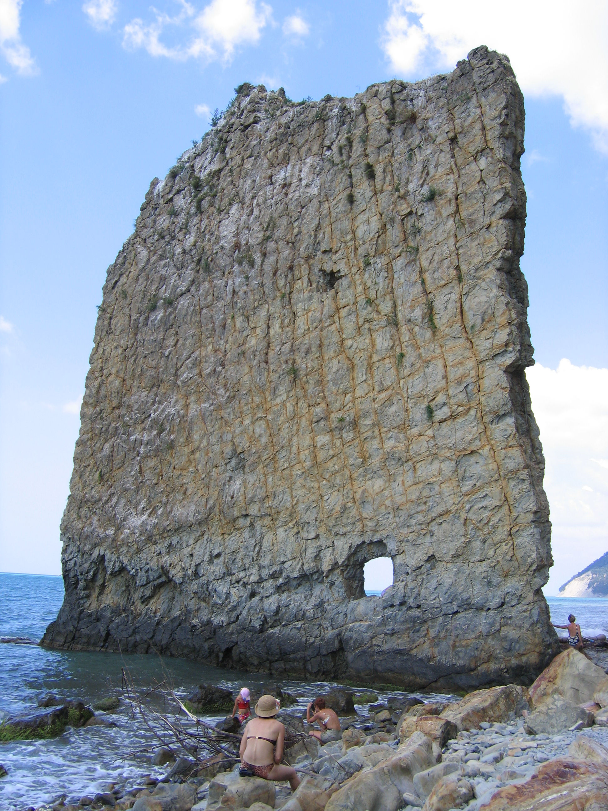 Parus rock, Krasnodarskiy region, Russia